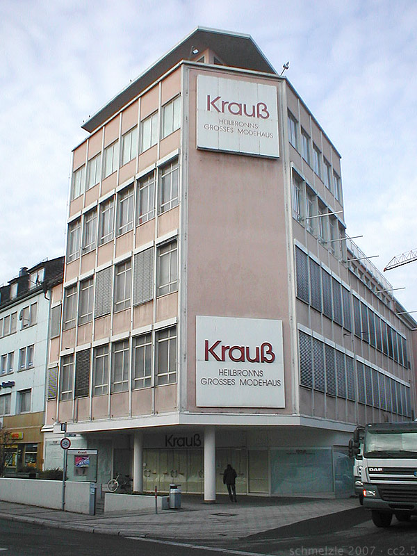 Ehemaliges Kaufhaus Barthel (zuletzt McKrauss) an der Allee in Heilbronn.